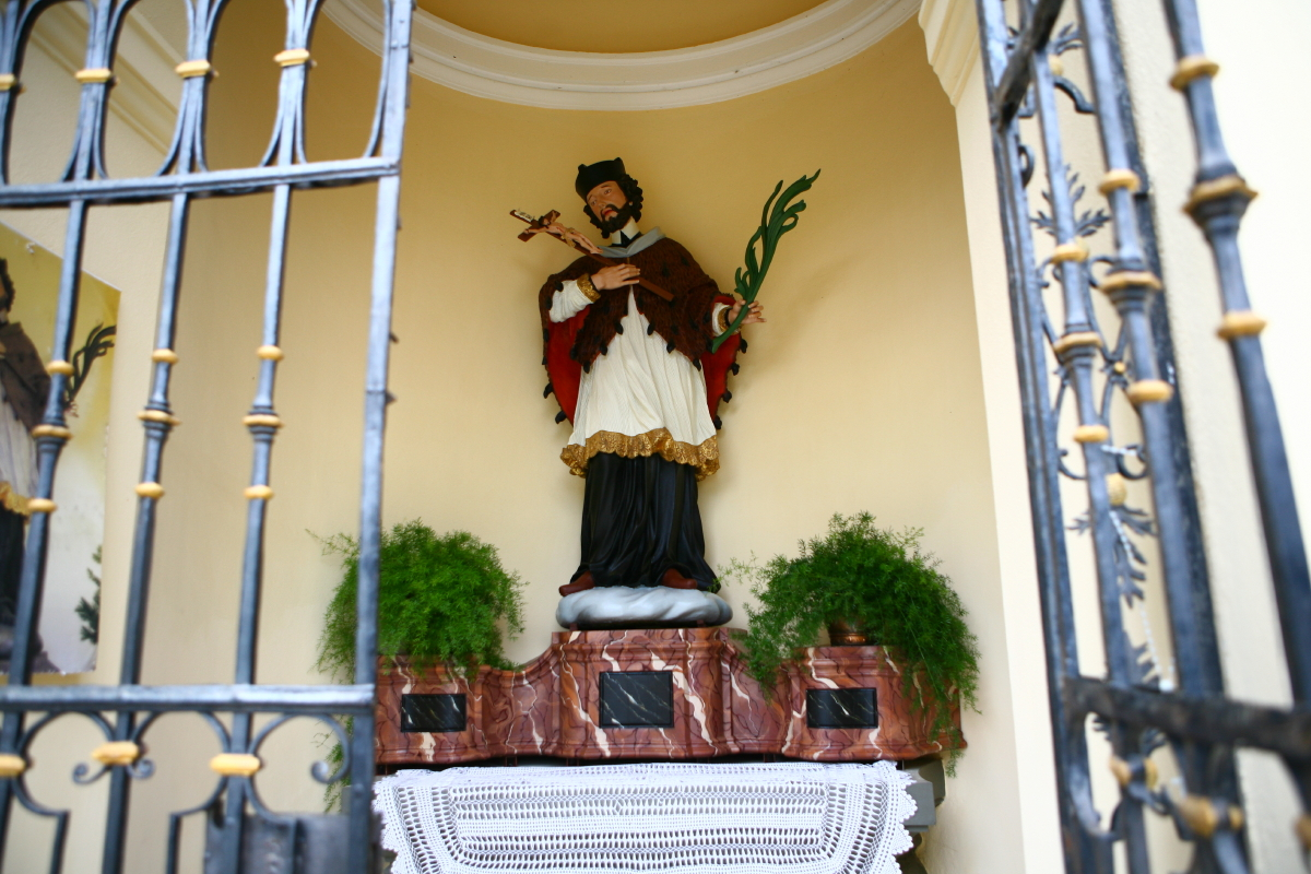 Der Brückenheilige Nepomuk in der Kapelle an der steinernen Brücke über die Schwarza in Reichenau an der Rax